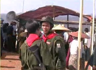 Miliziani birmani dell'etnia Pao